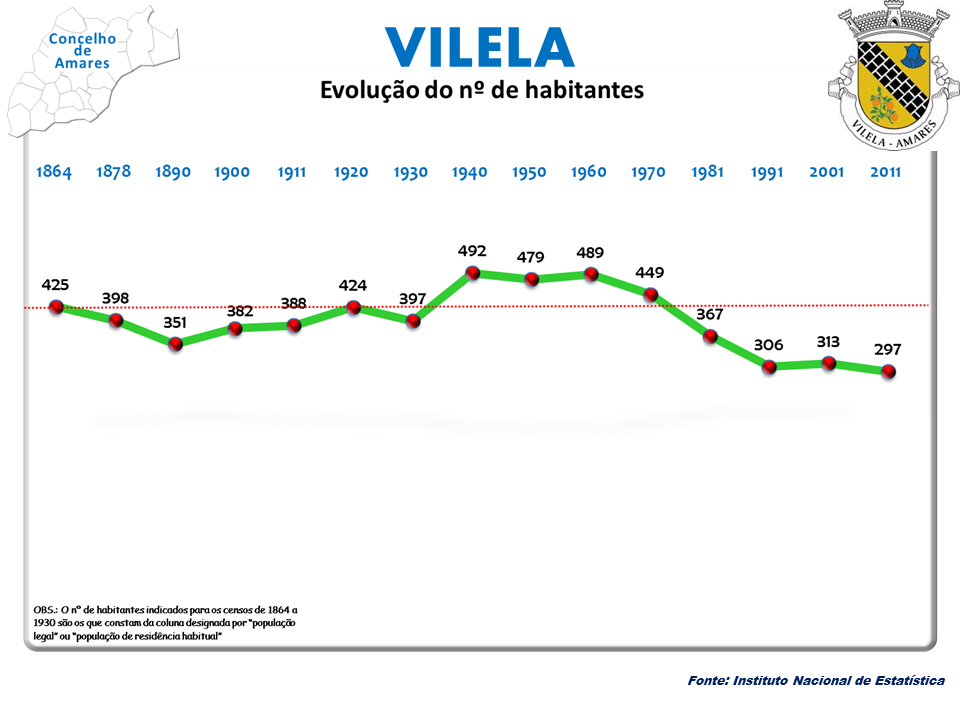 Censo 2011